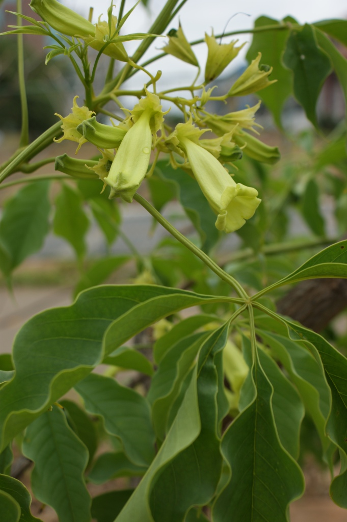 Cybistax antisyphilitica - BIGNONIACEAE Parque Olhos d' água - Brasília - Distrito Federal - Brasil.